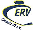 Vereinslogo ERV Chemnitz e.V.